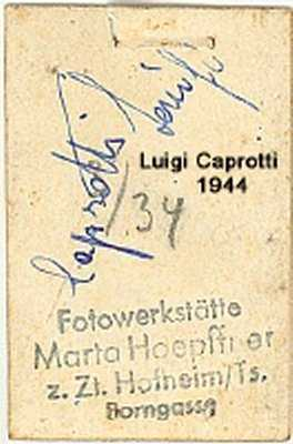 Luigi Caprotti prigioniero di guerra dei tedeschi - foto tessera eseguita presso Fotowerkstatte Marta Hoepffner z.Zl. Hofheim_am_Taunus tragitto dal Montenegro a Hofheim-am-Taunus, Borngasse percorso da Hofeim am Taunus a Diez, Germania, Stalag XII-A Limburg, Germany Prison Camp for Non-Coms